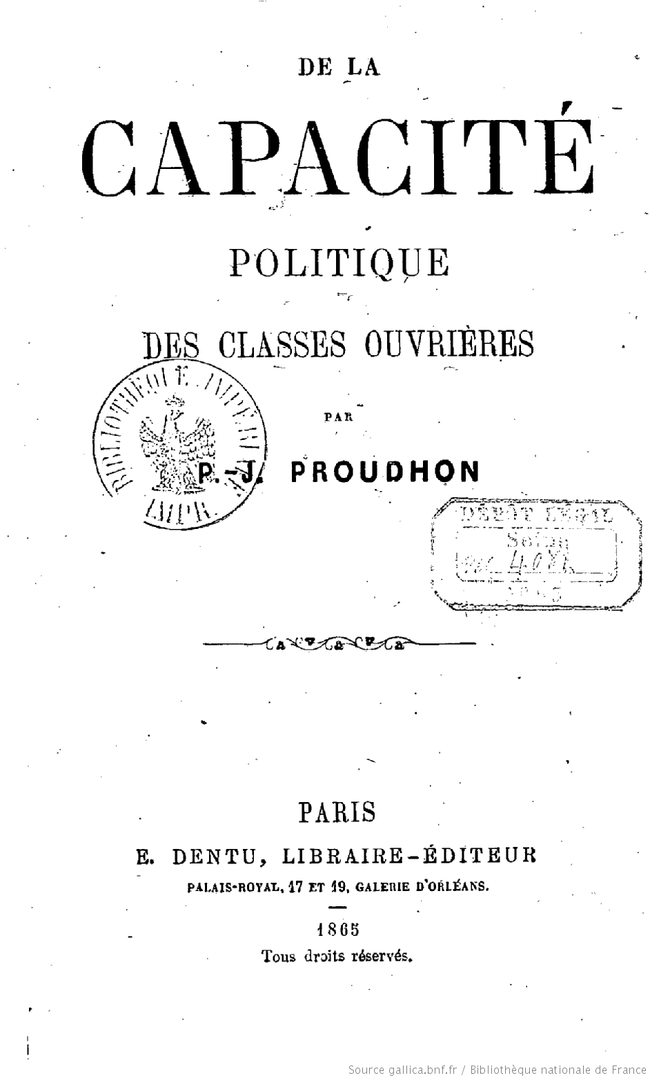 Pierre-Joseph Proudhon - De la Capacité politique des classes ouvrières - 1865.